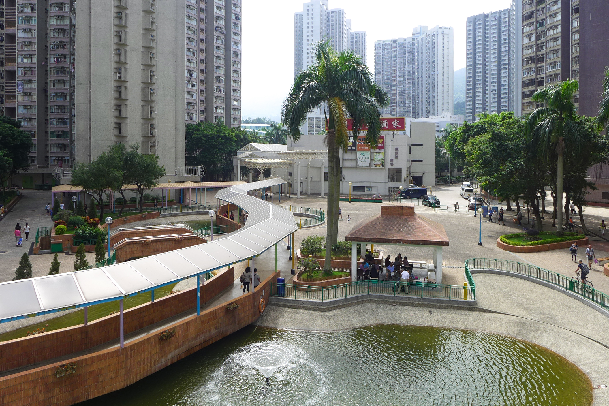 Wan Tau Tong Estate Garden